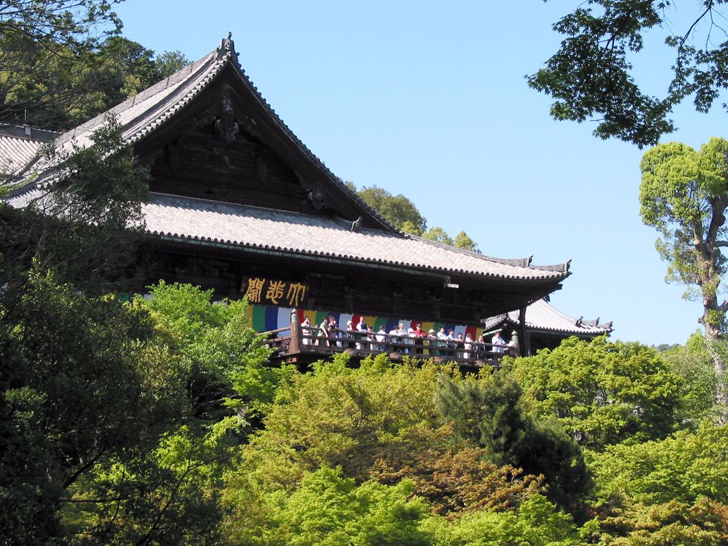 Hondo of Buzan Hasedera at Sakurai, Nara, Japan. 真言宗豊山派総本山長谷寺の本堂（国宝）奈良県桜井市初瀬で撮影 軒下の扁額(縦1.3 m 横3.8 m)に書かれた大悲閣の文字は篆刻家大久保翠洞の揮毫によるもので、大悲観音（観世音菩薩）を安置した本堂を意味する